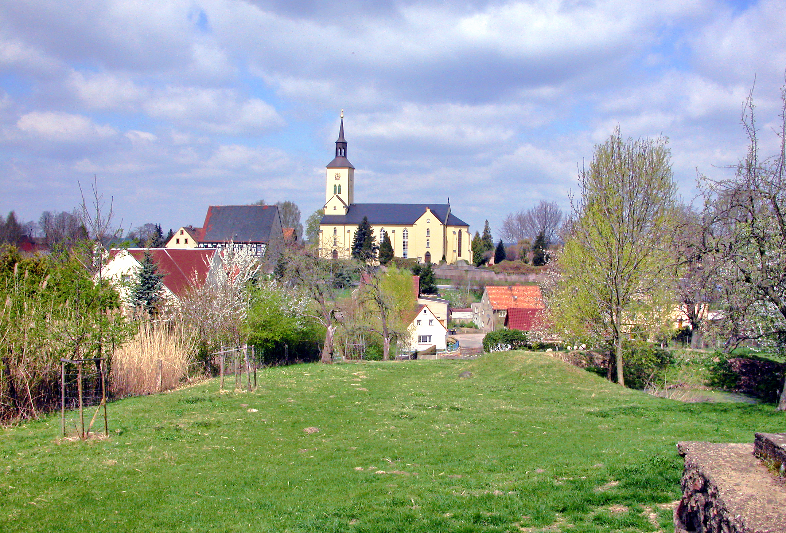 22.04.2010 09661 Etzdorf (Striegistal), Waldheimer Str. 17 (GMP: 51.050542,13.179933): St. Marien Kirche von Südten, erbaut 1865/66 nach Abbruch der alten Dorfkirche. [DSCN41636.TIF]20100422015DR.JPG(c)Blobelt